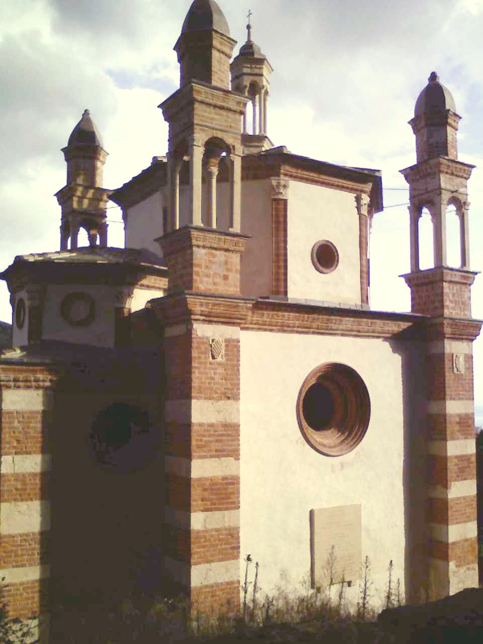 Chiesa di Nostra Signora di Loreto o Chiesa dei Cinque Campanili nella frazione di Perti in Finale Ligure (Italy)